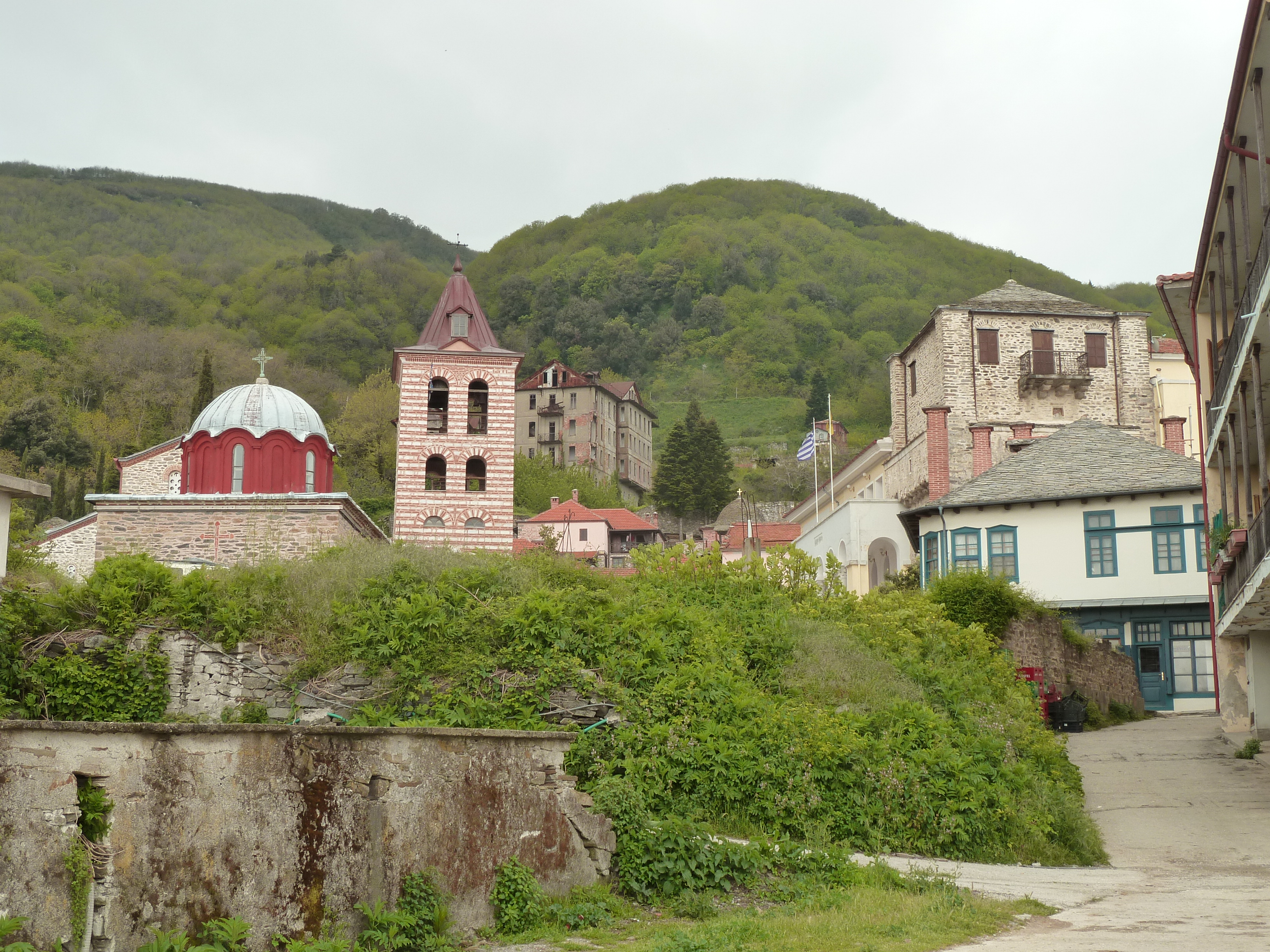 Karyes (Mont Athos)